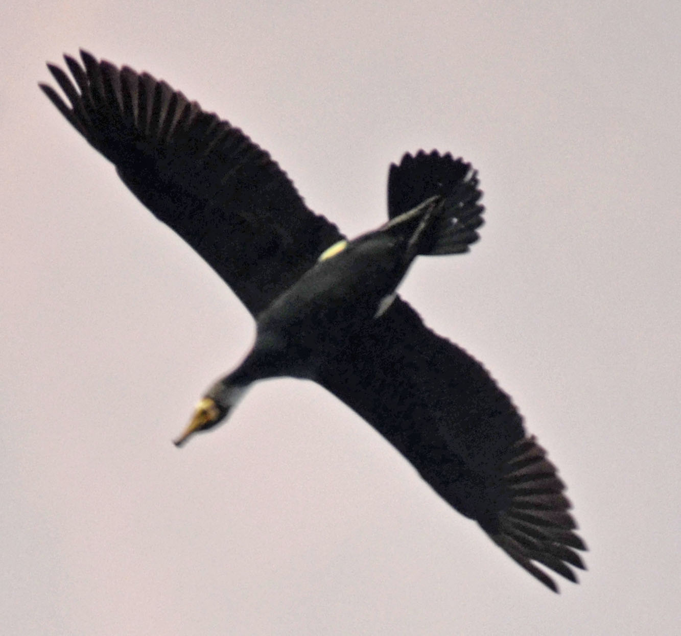 Phalacrocorax carbo, photograhié à Lille au dessus de la Deûle canalisée. Les taches blanches situées sur les cuisses sont ici bien visibles. Unknown